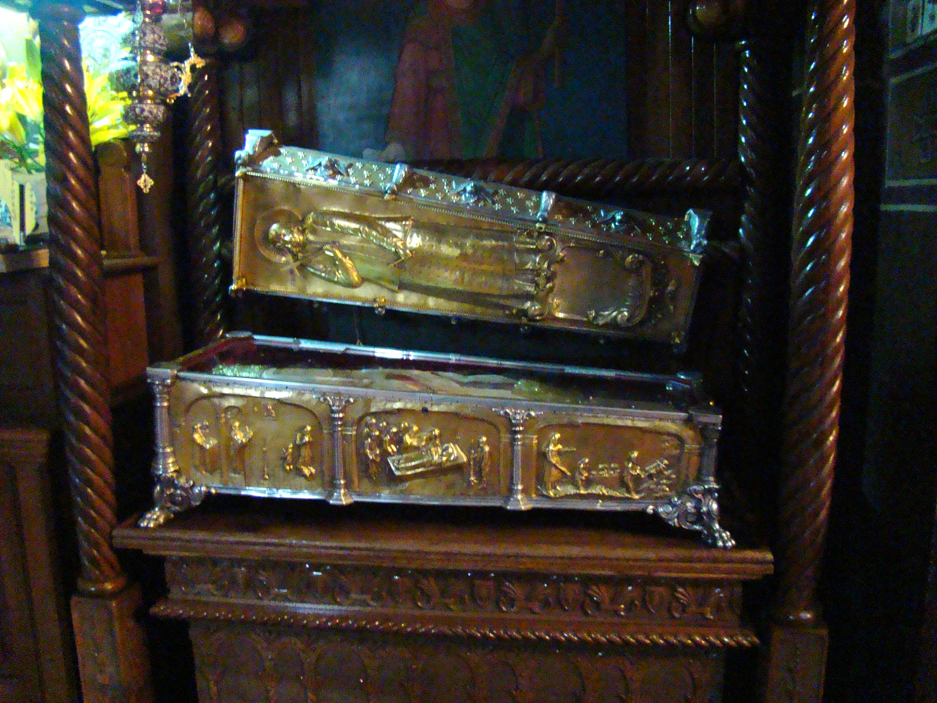 Biserica Episcopală "Adormirea Maicii Domnului", moaștele sfintei Filofteia 01